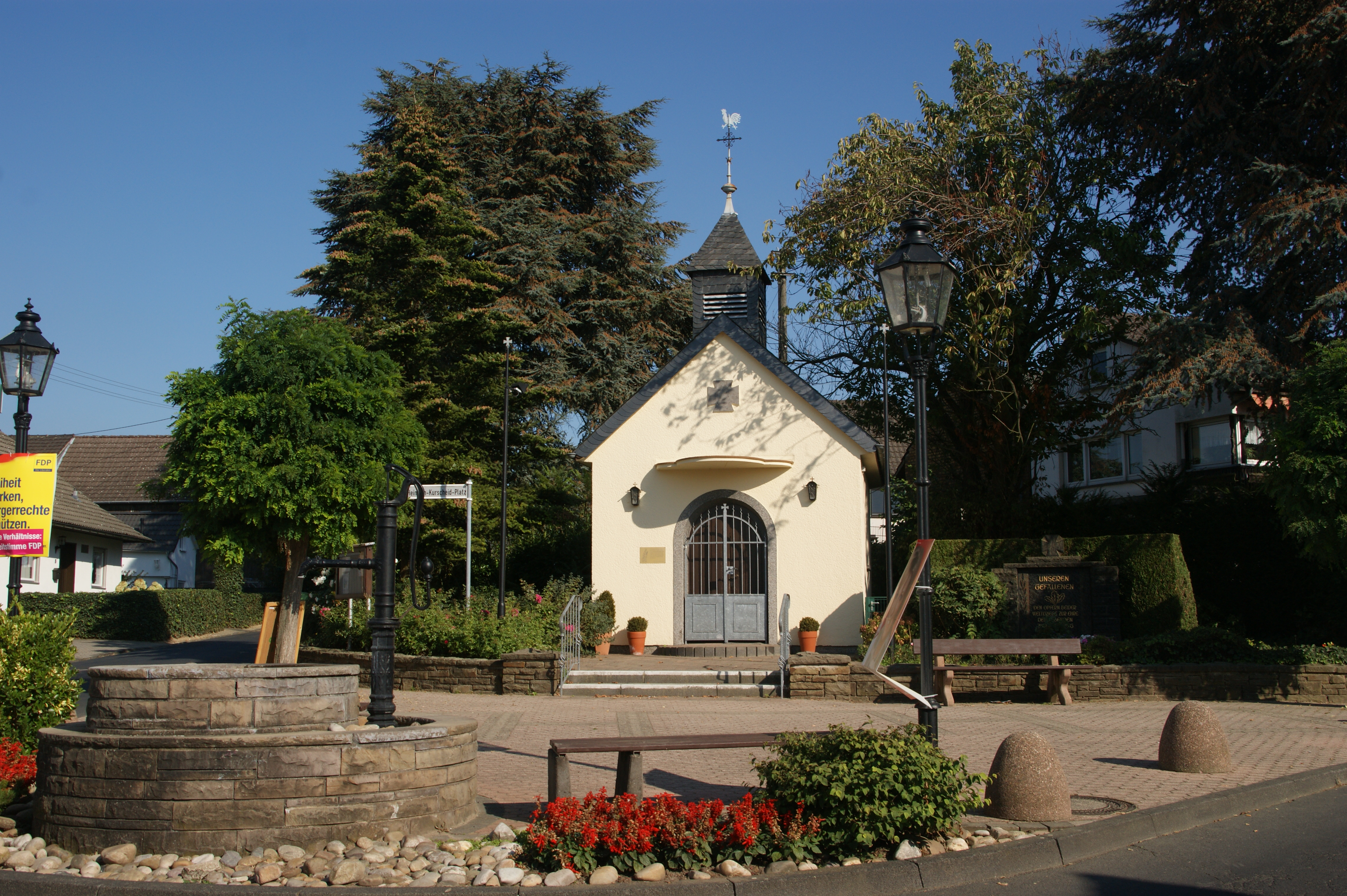 Brunnen (mit Wasserpumpe) und Donatuskapelle in Rauschendorf, Königswinter (